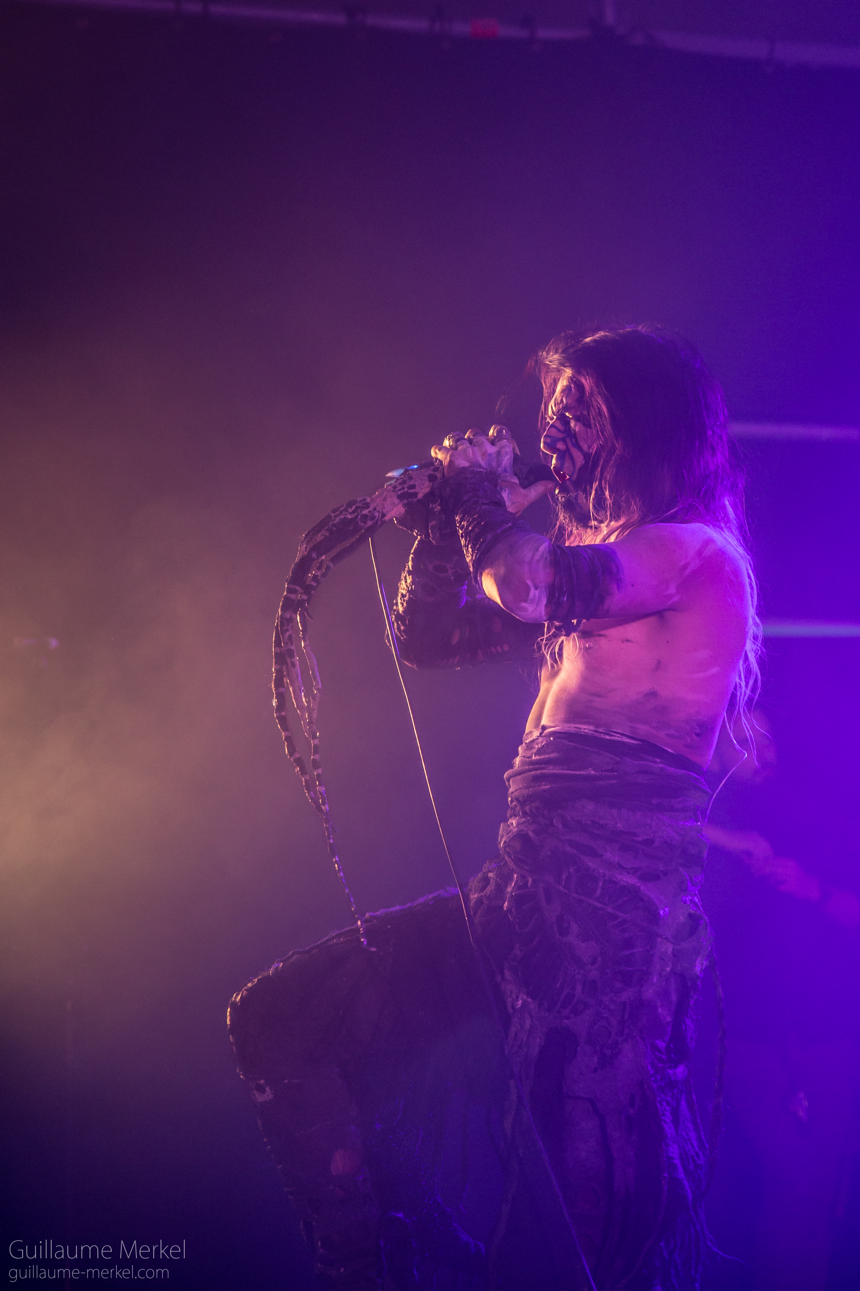 Igorrr à Selestat en 2017